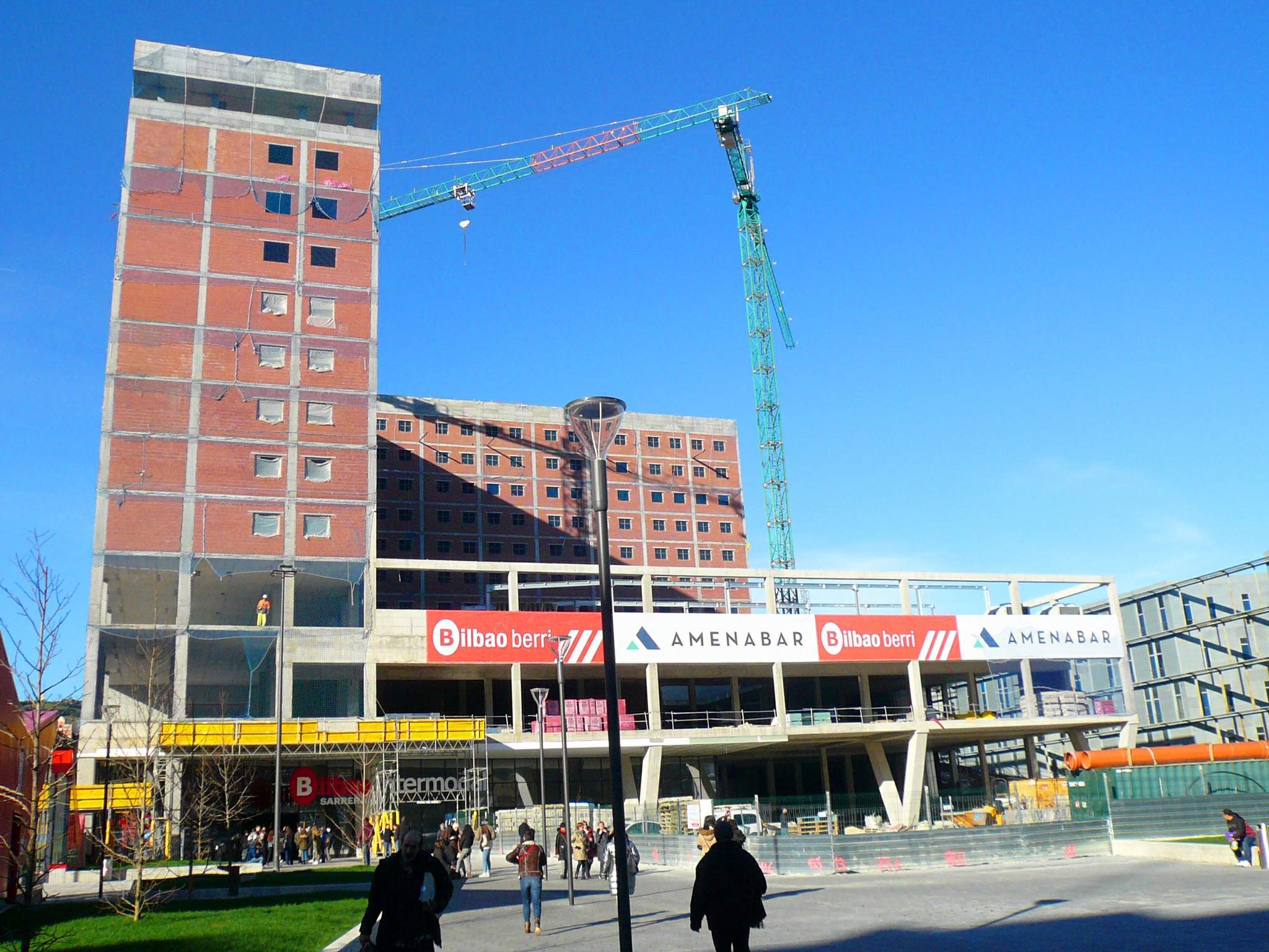 Intermodal de Bilbao, fotografiada el 30 de diciciembre de 2019